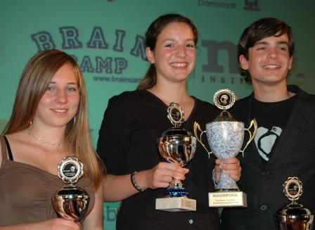 Gewinner der Jugend auf der deutschen Gedächtnismeisterschaft 2005